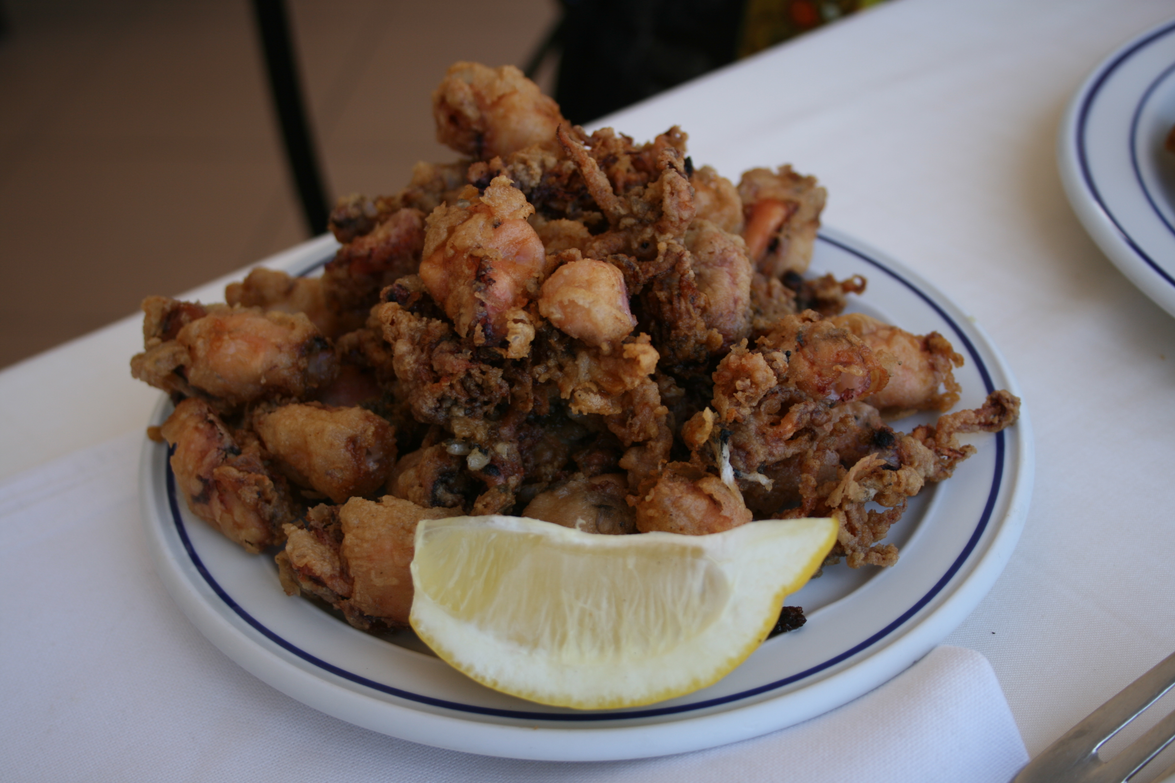 Chopitos (Valencia)